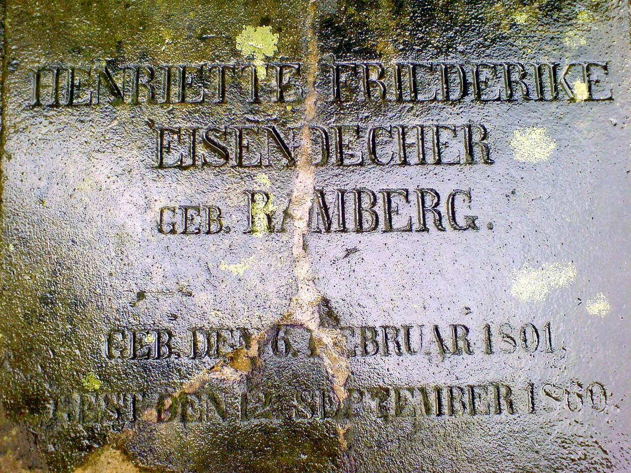 Foto im nassen Zustand: Inschrift der Grabplatte von Henriette Friederike Eisendecher, geborene Ramberg, geboren am 6. Februar 1801, gestorben am 12. September 1860 als Ehefrau und Witwe von Friedrich August Christian Eisendecher; Neustädter Friedhof in Hannover ...